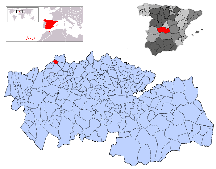 Sartajada en la provincia de Toledo